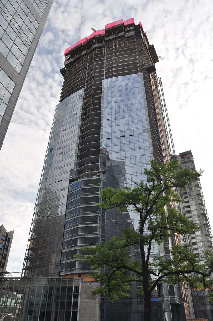 June 19, 2011